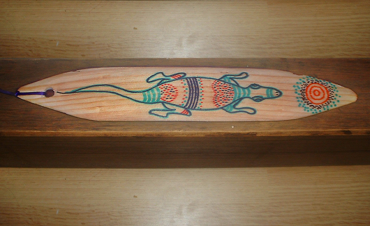 Esto es una churinga o bramadera, esta tiene unas medidas de 30cm de larga, 5cm de ancha y 0'7 cm de grosor.